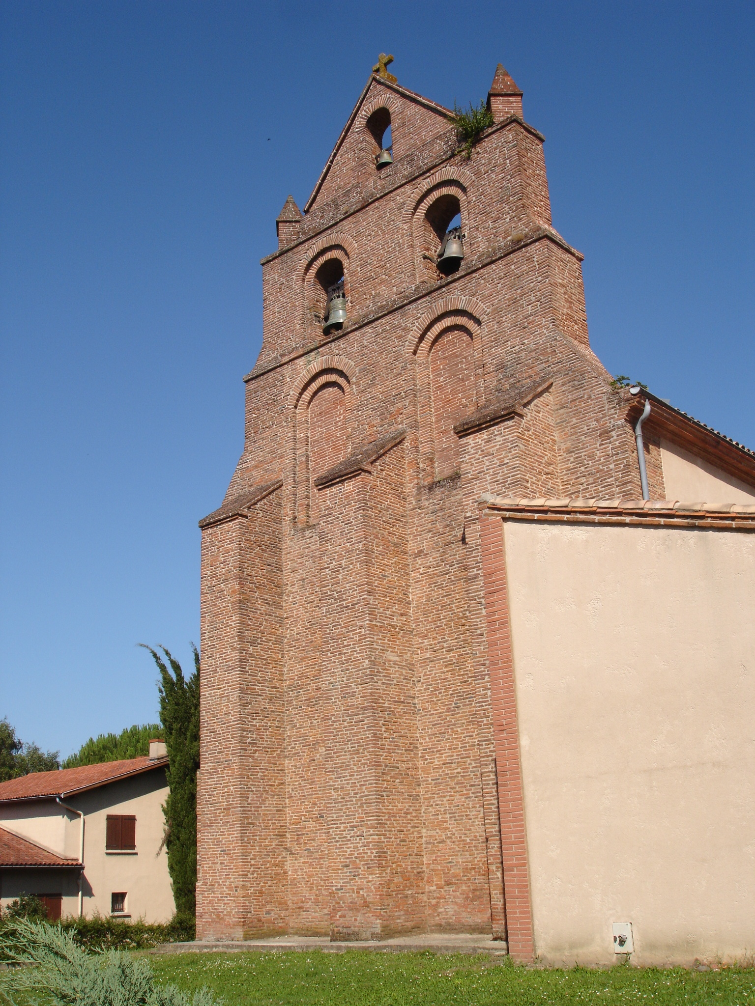 Église d'Auzeville-Tolosane (Haute-Garonne, France).